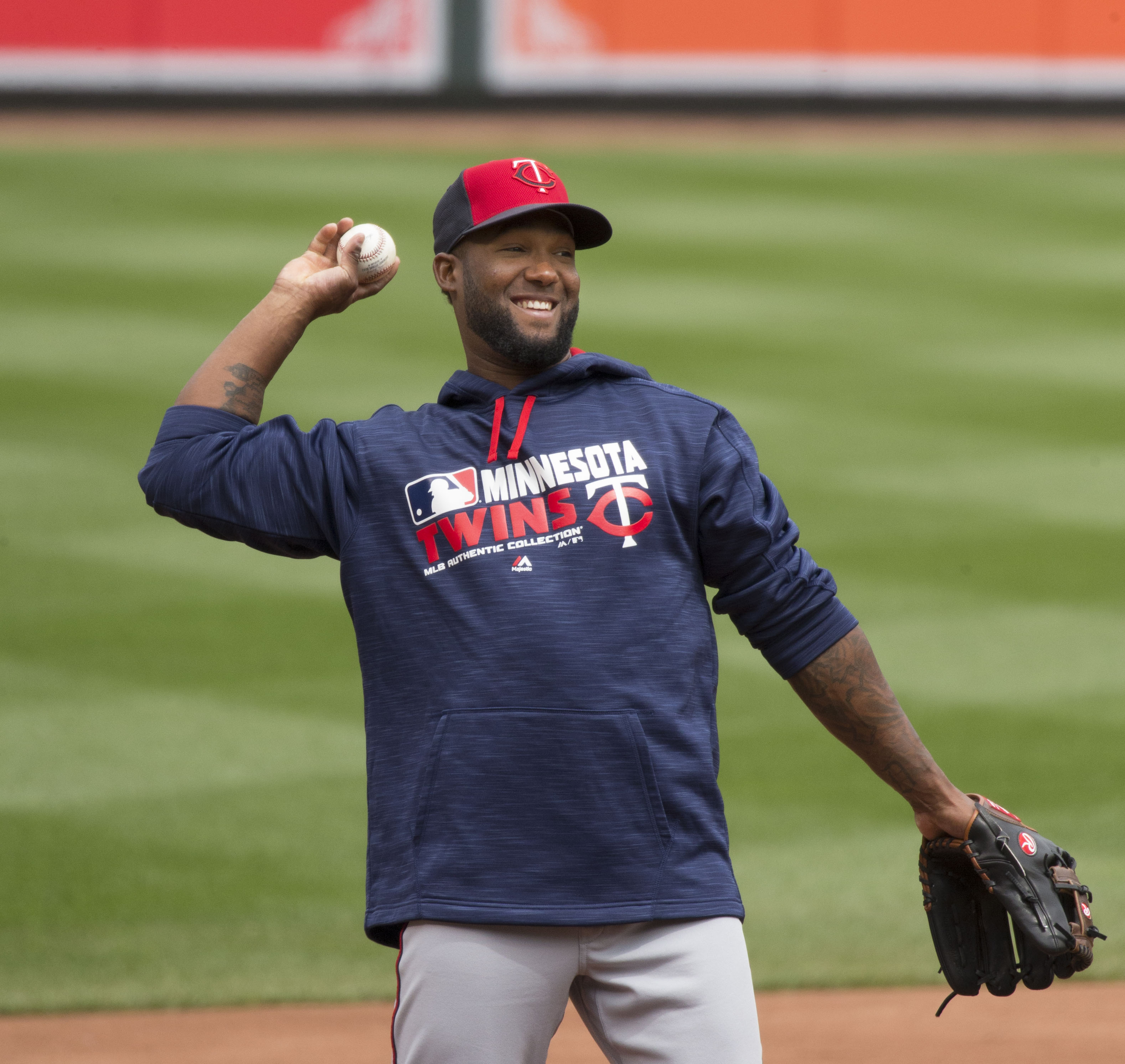 Danny Santana